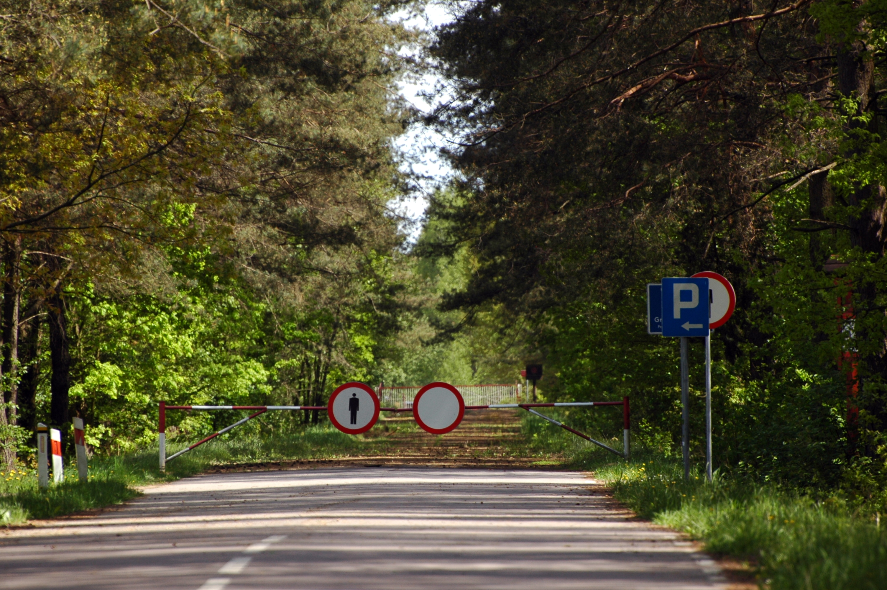 Koniec drogi wojewódzkiej nr 640 w Koterce